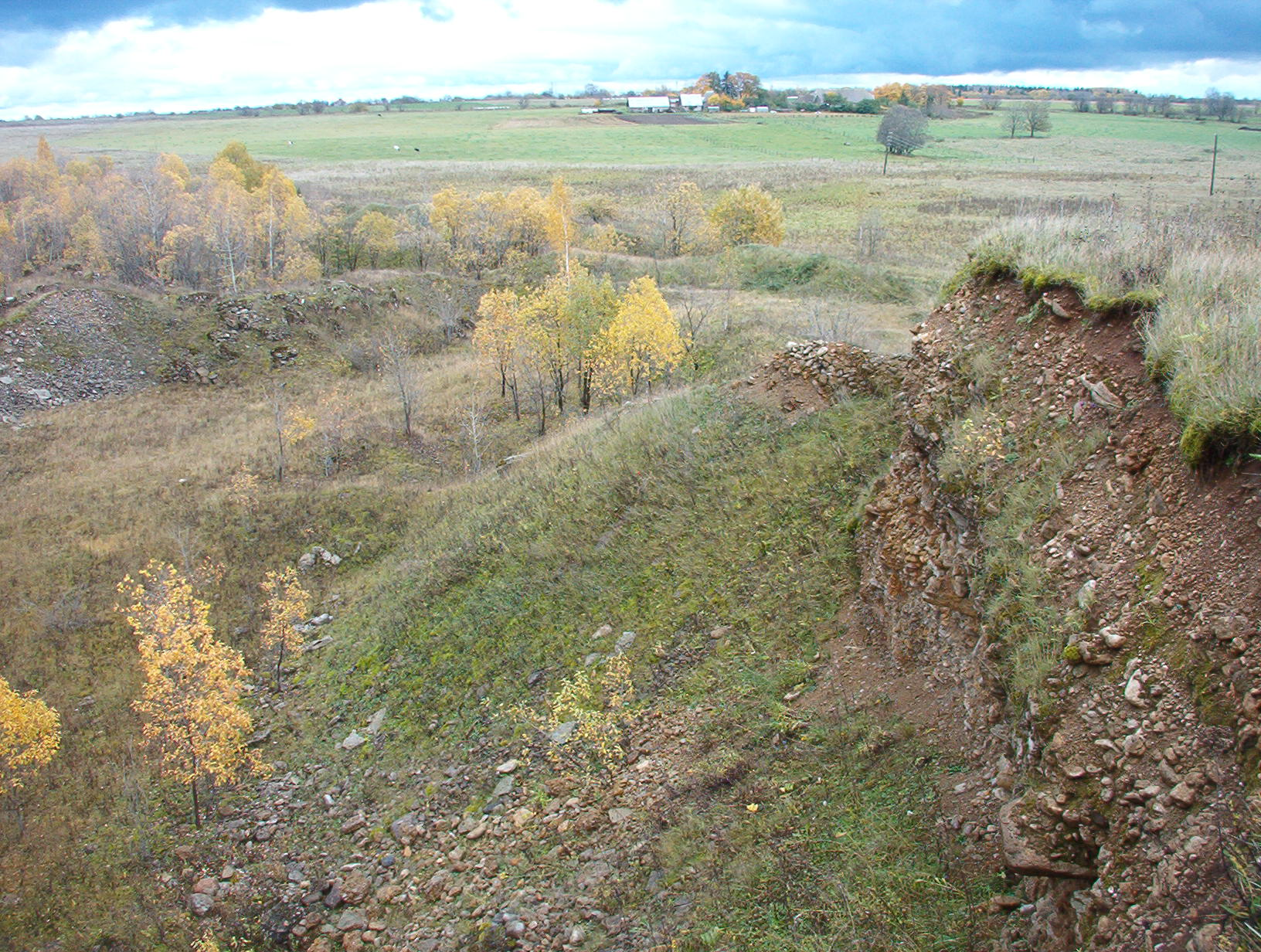 Kunda hiiemägi